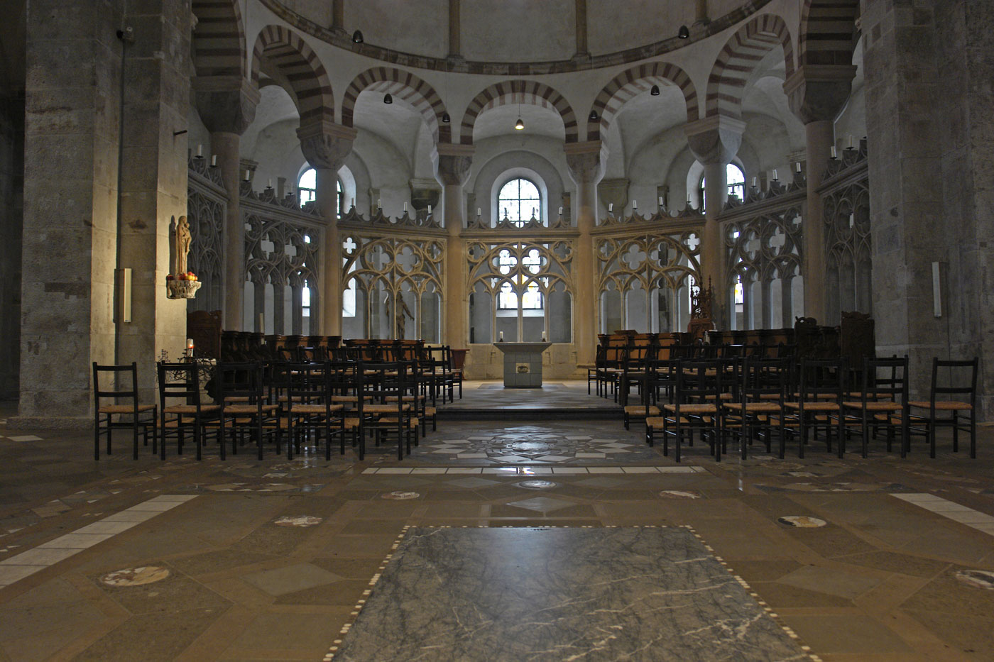 Köln, St. Maria im Kapitol, Chor